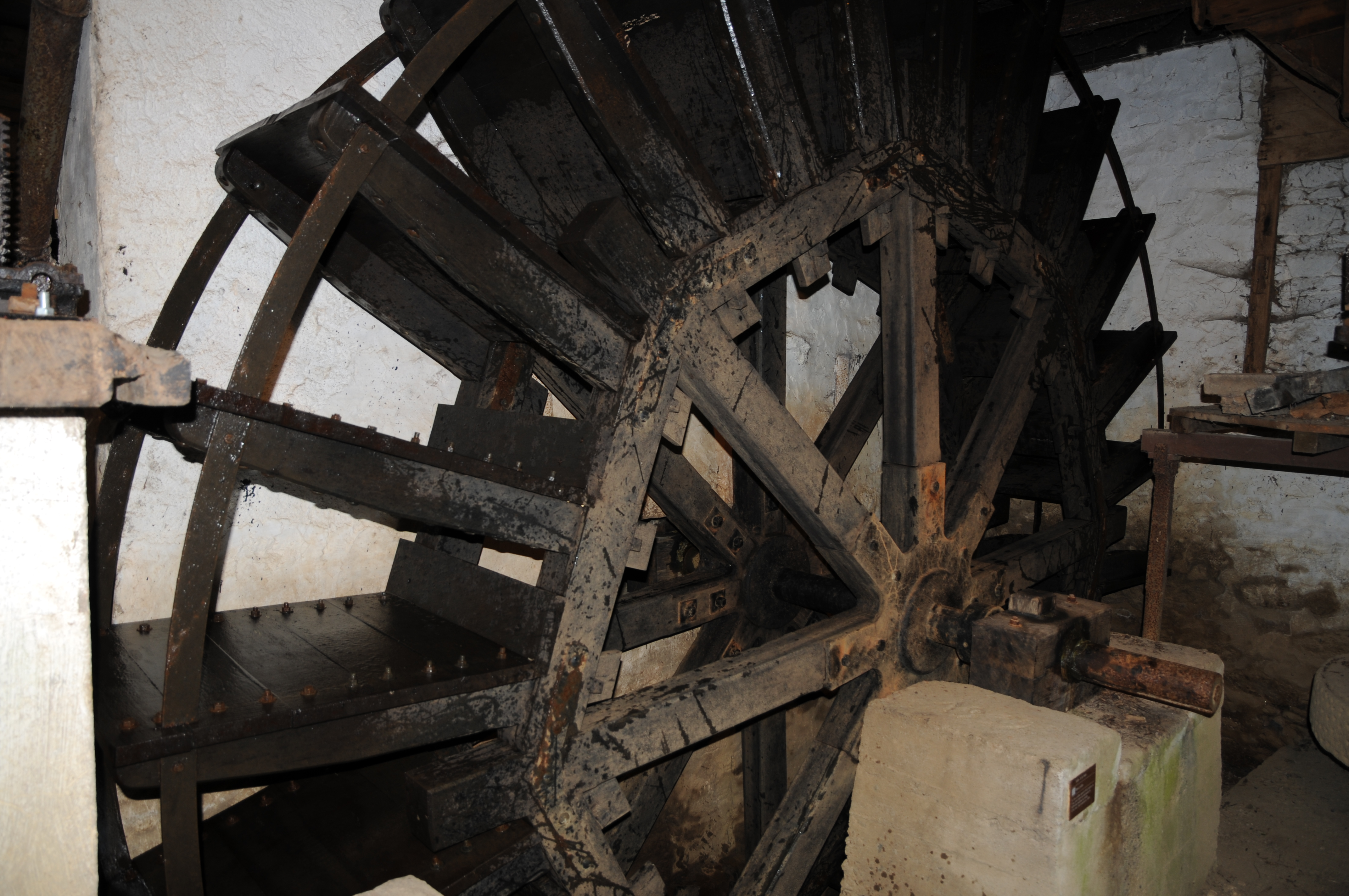 La roue à aubes du Moulin de Rambourg - Photo La Roche-sur-Yon Agglomération, J. Auvinet.